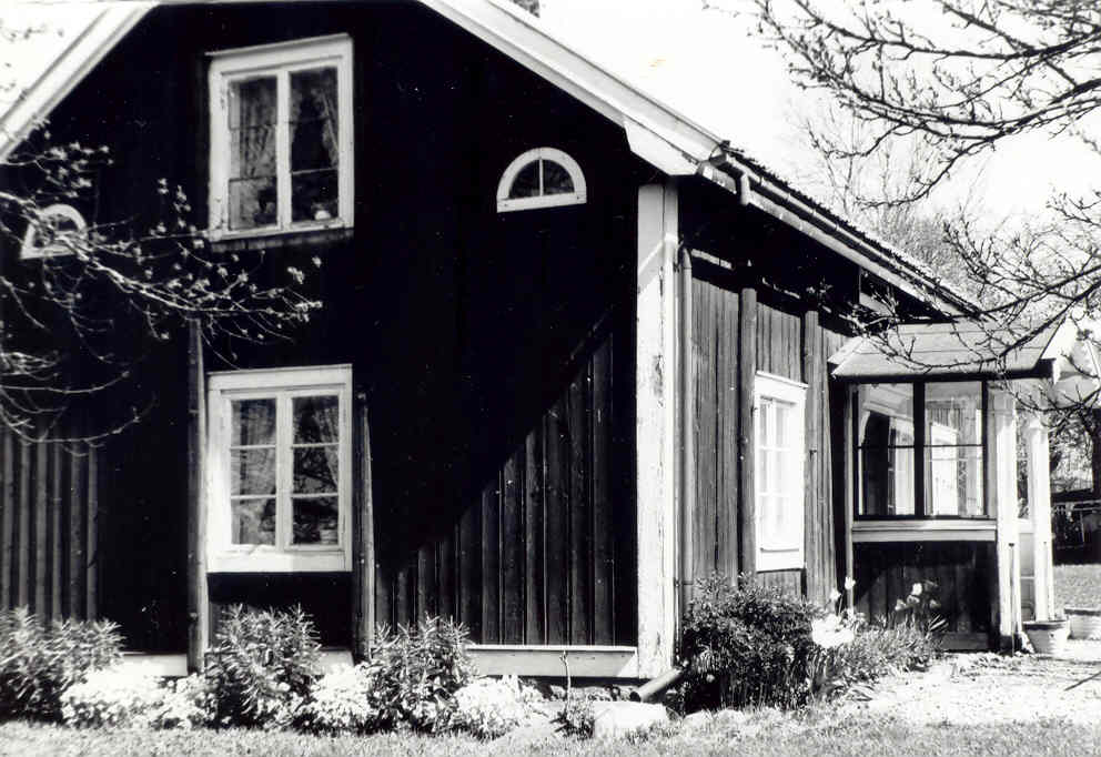 Gustav Sandgrens barndomshem i Västra Stenby, Motala kommun, våren 1994. Ett fotografi taget av Harri Blomberg.